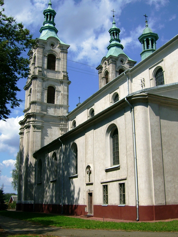 Piekoszów - kościół par. p.w. Narodzenia NMP (zabytek nr rejestr. A/441)